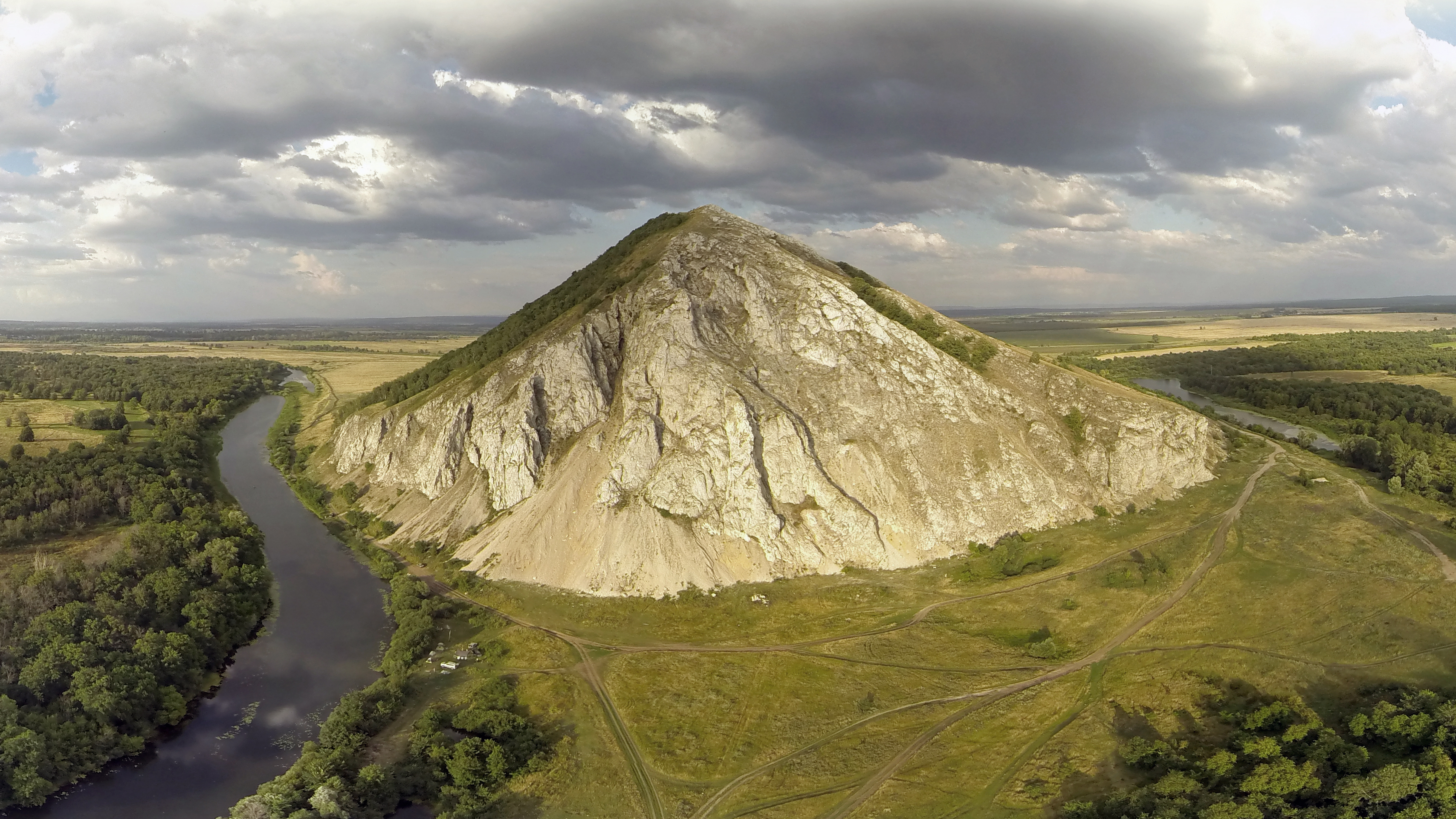 Гора Юрак-Тау, Стерлитамакский район This image is related to the protected area of Russia number 0210204